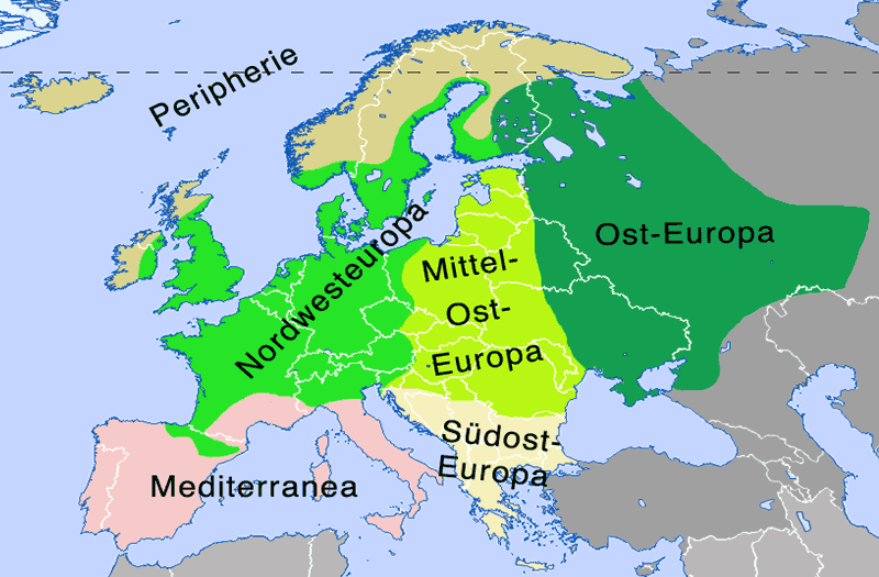 Karte der Kulturareale bzw. Historischen Regionen Europas Quellen Kartographie: Eckert VI-Projektion (nahezu flächentreu, realistische Größenverhältnisse, relativ wenig verzerrt), erstellt mit (Lizenz CC-BY) Datengrundlagen: Europa: Christian Giordano: Interdependente Vielfalt: Die historischen Regionen Europas. in: Karl Kaser u.a. (Hg.): Europa und die Grenzen im Kopf, Wieser-Verlag, Klagenfurt 2003, S. 113 - 134.